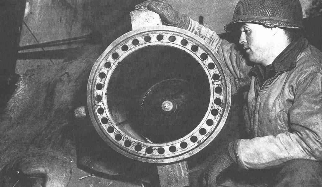 US soldier examines captured Sturmtiger's 380mm barrel